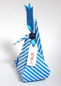 お福分け折鶴 『祝成人』